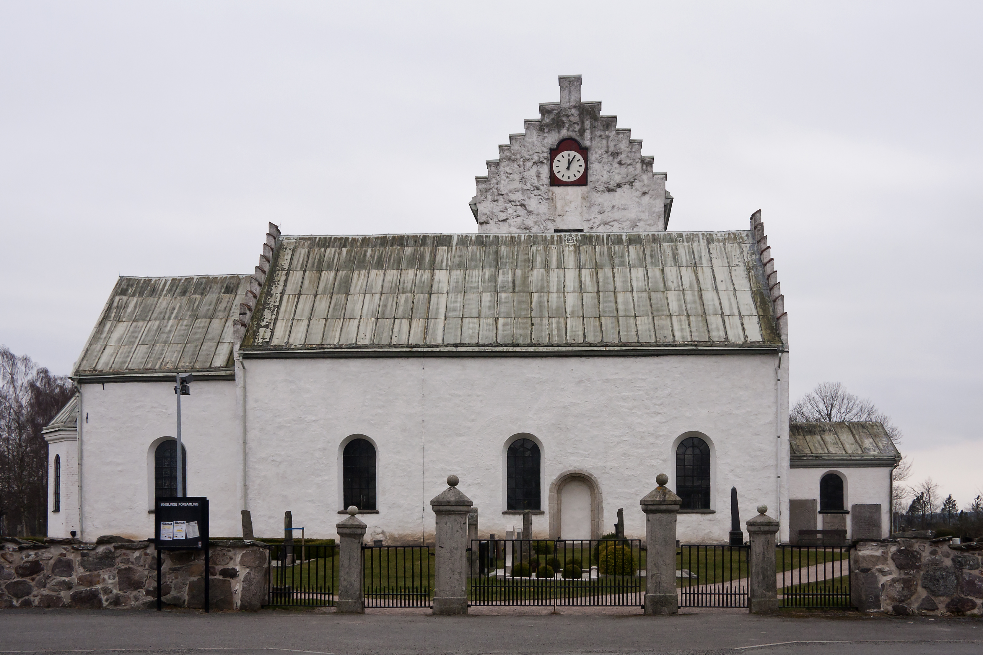 Knislinge kyrka i Östra Göinge kommun.